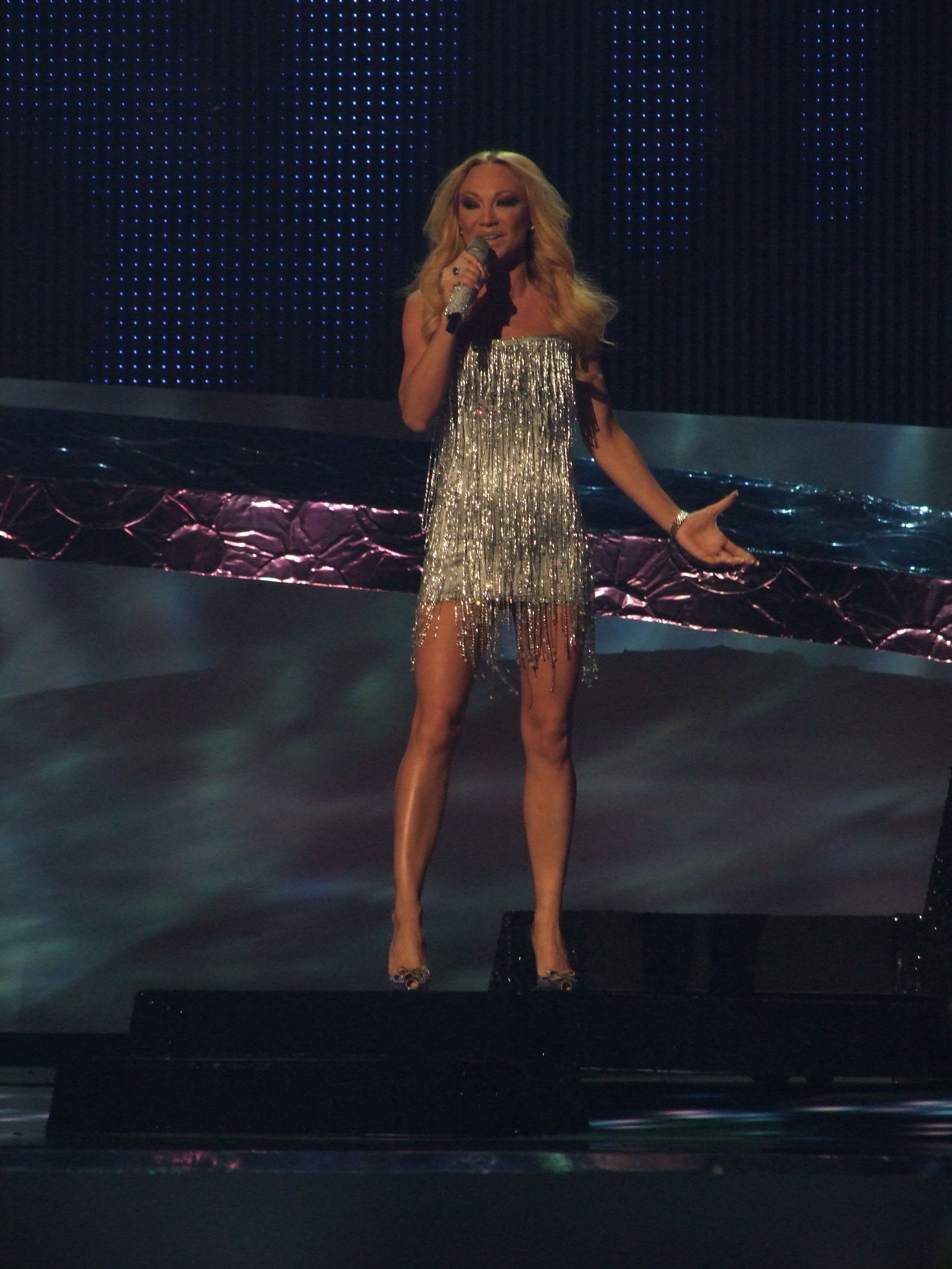 Final Eurovision 2008